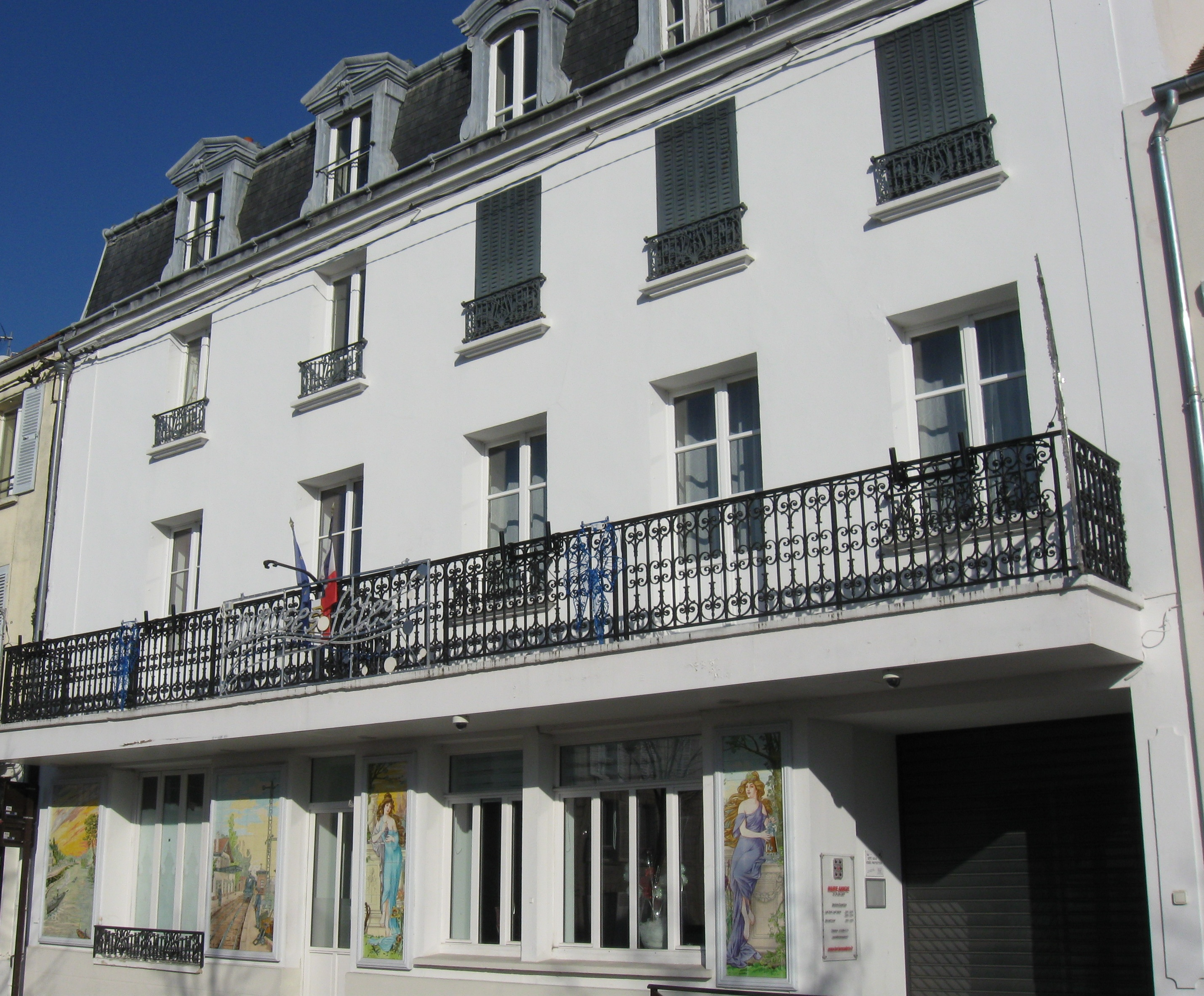 Mairie annexe de Ferrières-en-Brie, ancien café Saint-Rémy. (Seine-et-Marne, région Île-de-France).